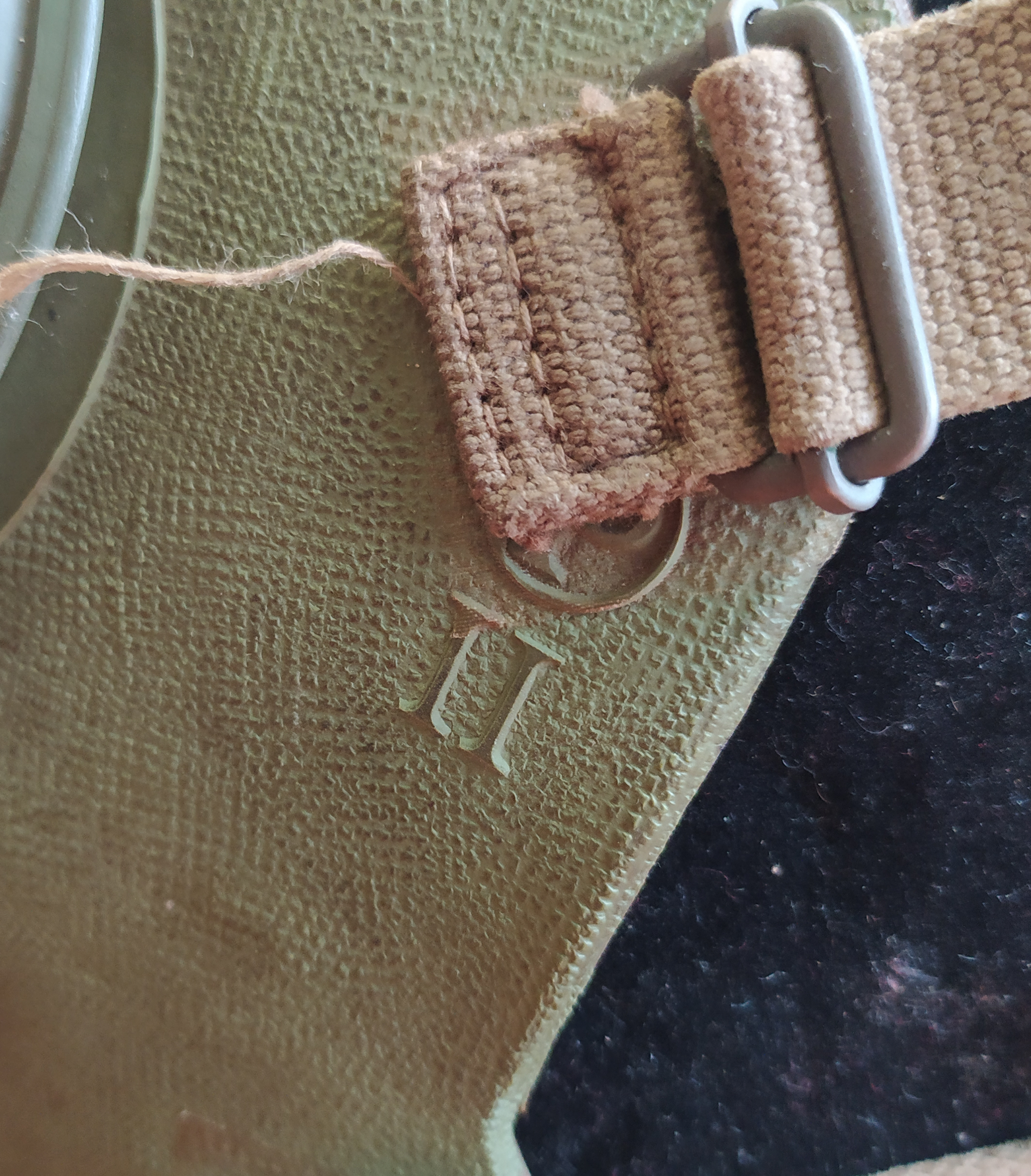 Marchio "P" sulla parte sinistra del facciale di una Penna. Un tirante attaccato male copre parzialmente la scritta